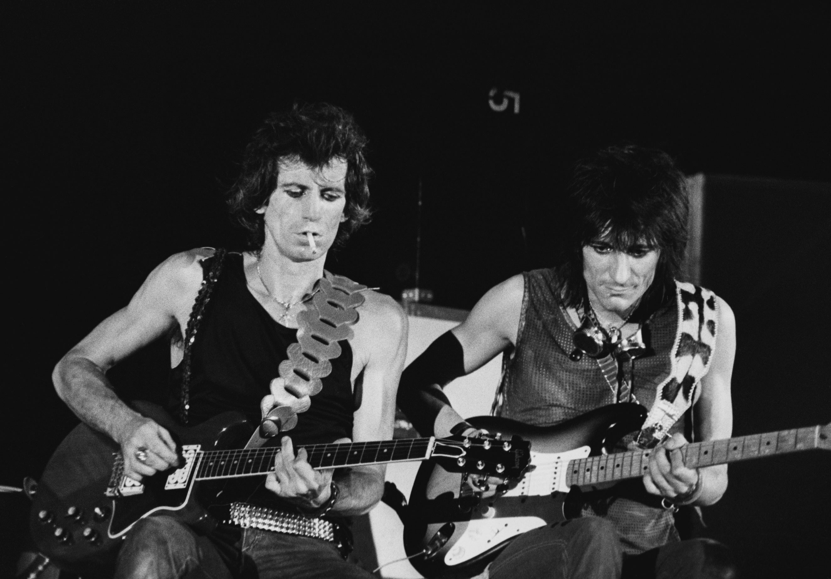 Concerto dei Rolling Stones a Torino, 1982, Keith Richards e Ron Wood